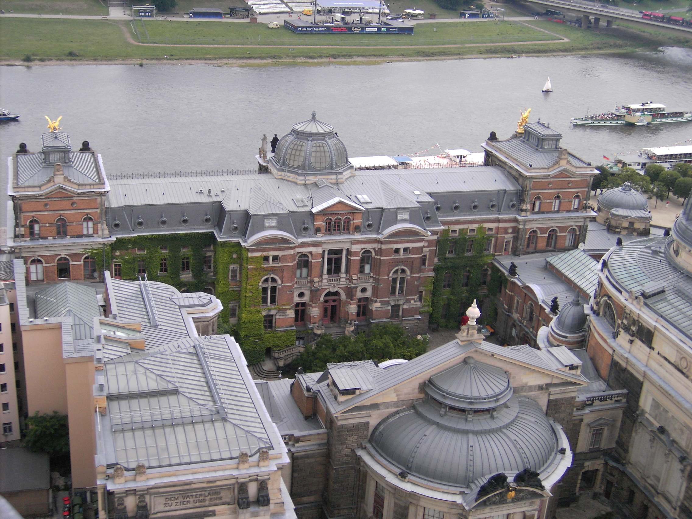 Hochschule für Bildende Künste Dresden. View from the Frauenkirche.